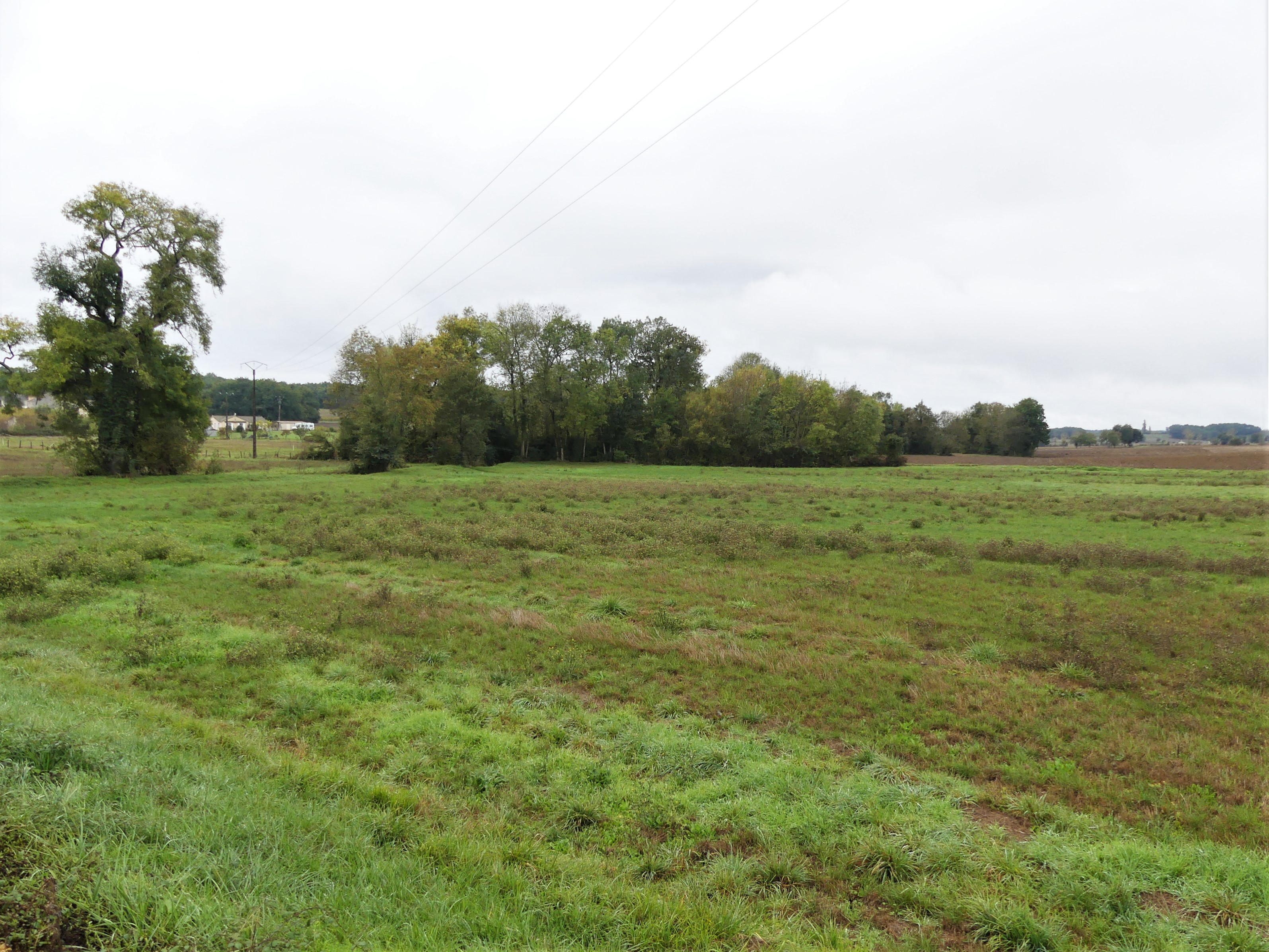 La vallée de l'Escourou au nord du bourg, Sainte-Innocence, Dordogne, France. La ligne d'arbres marque le cours de l'Escourou.